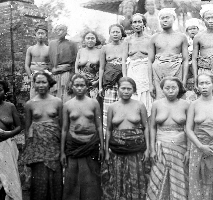 Repronegatief. Een groep mannen en vrouwen uit Sasak